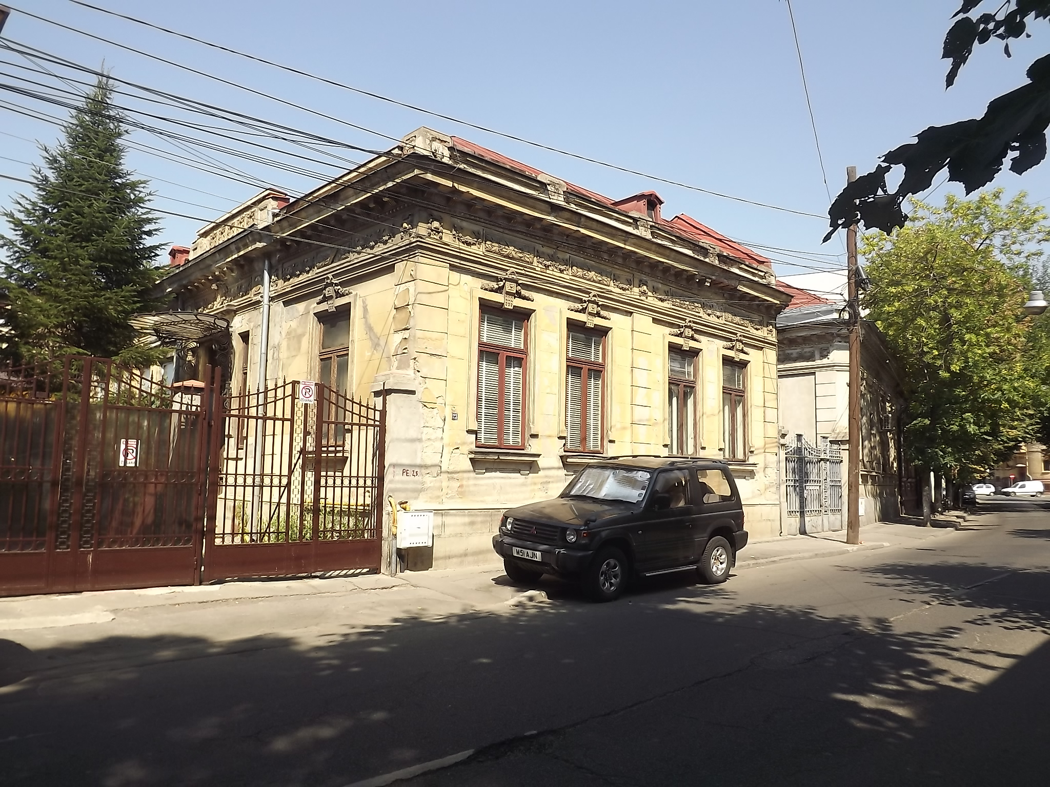 Casăilui